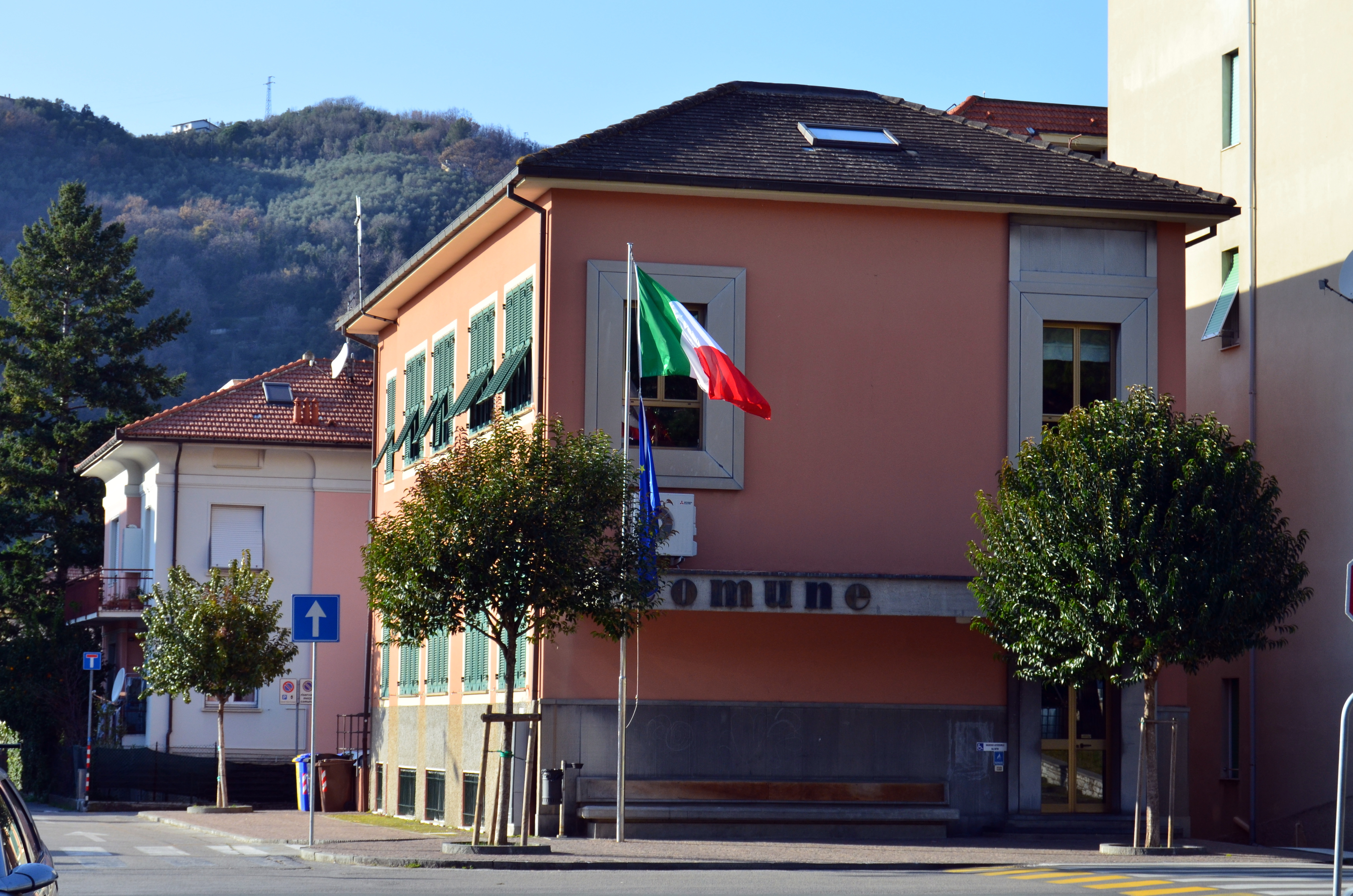 Municipio di Cogorno, Liguria, Italia